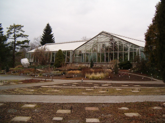 Botanischer Garten Dresden, Greenhouse Picture taken by: User:BotBln Date: 2007 02 19